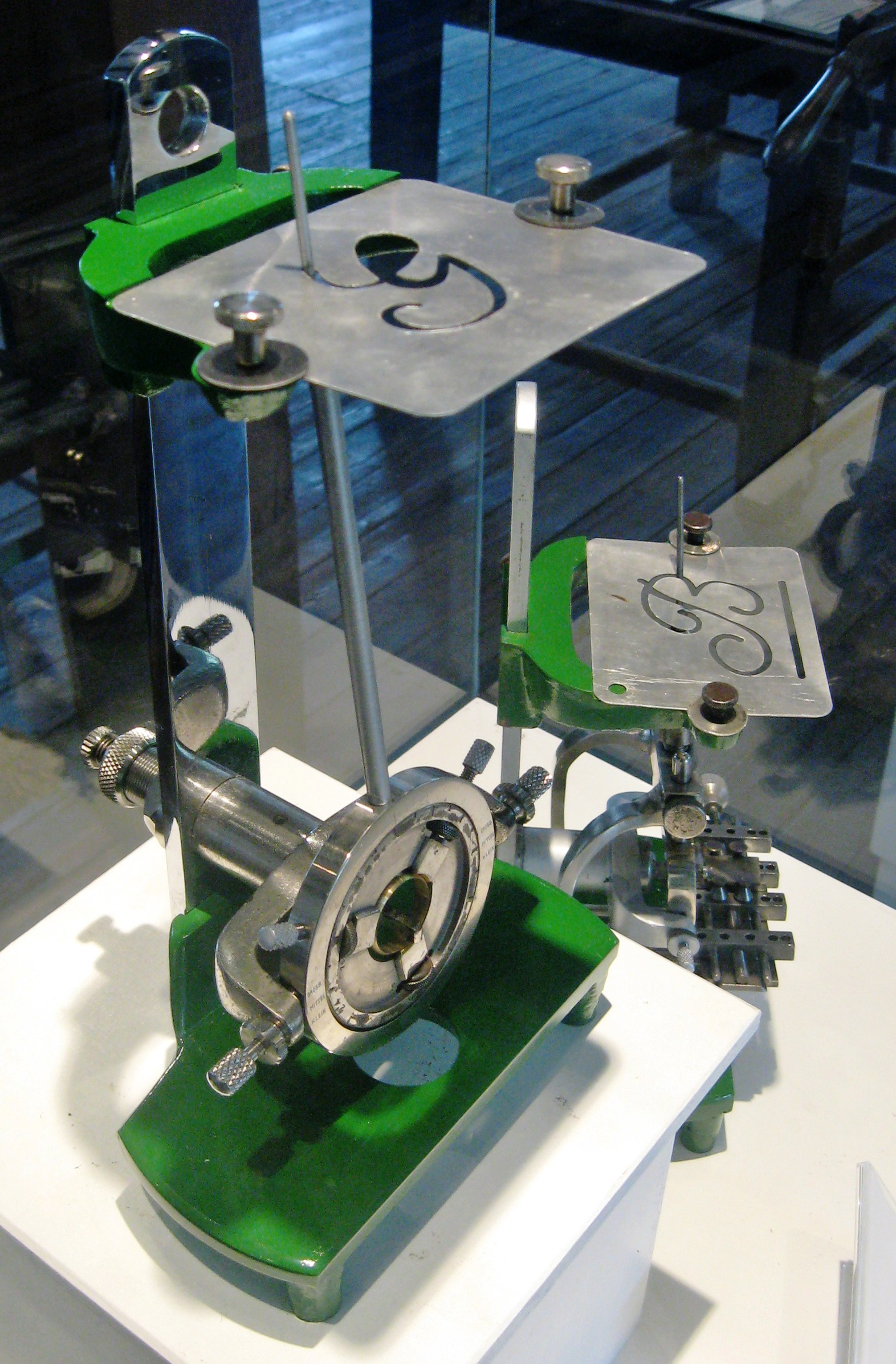 Von Johann Peter Hartfuß entwickelte Graviermaschine für Trauringe